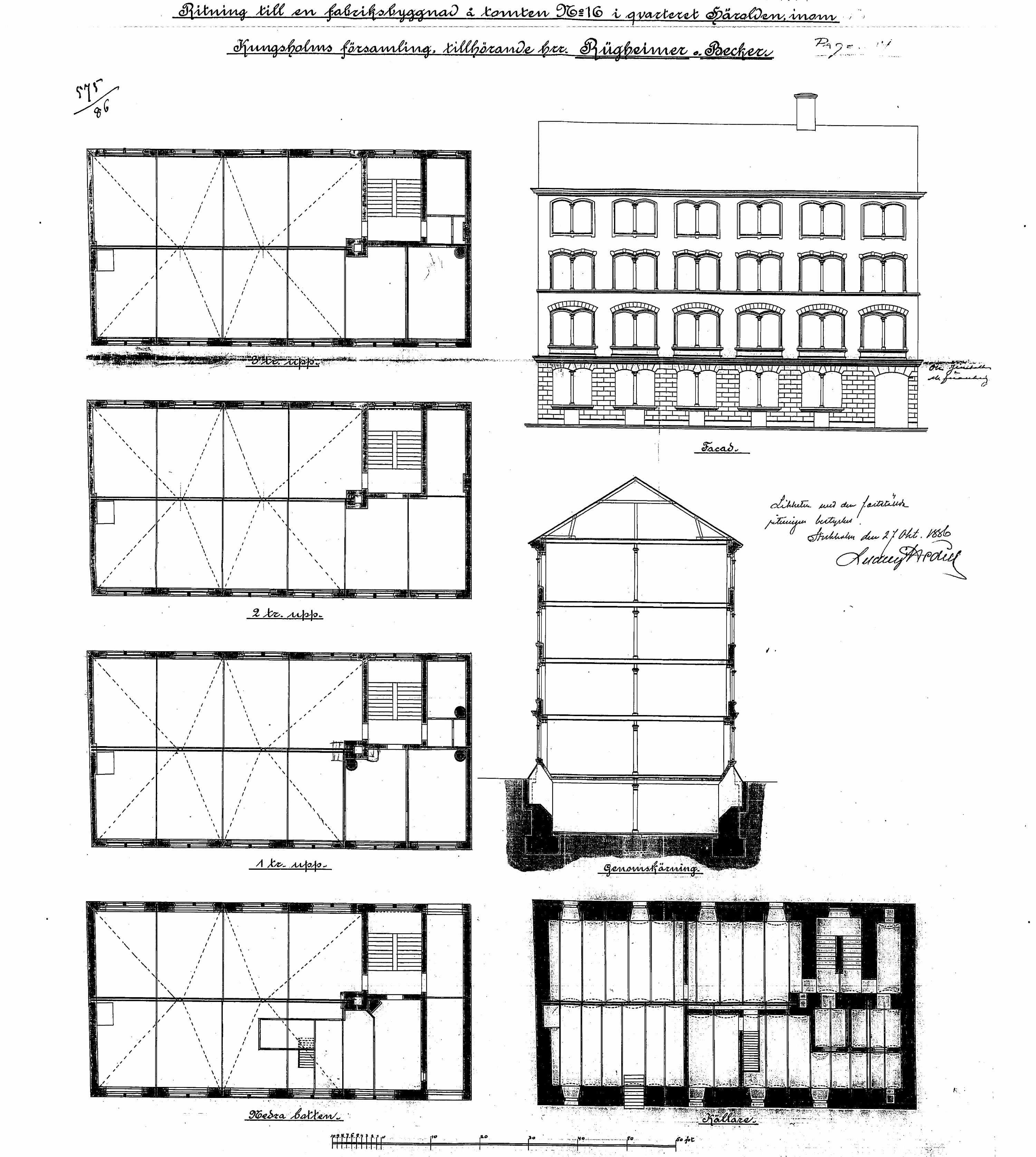 Pagen 14, gårdshuset, planer, sektion, fasad